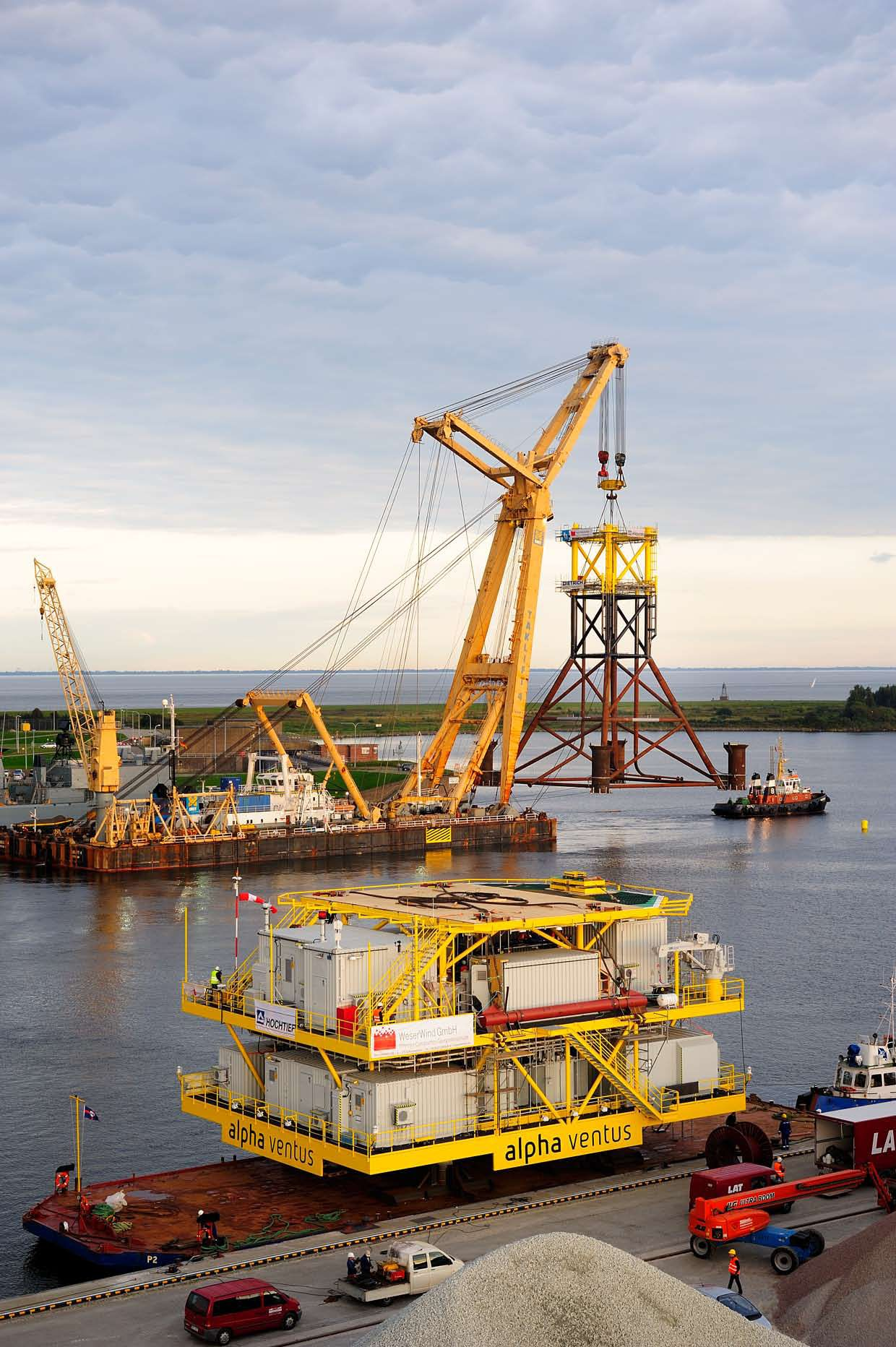 Das Jacket des Umspannwerks für den ersten deutschen Offshore-Windpark "alpha ventus" verlässt die Fertigungsstätte der WeserWind GmbH Offshore Construction Georgsmarienhütte in Wilhelmshaven. Im Vordergrund die dazugehörige TopSide.